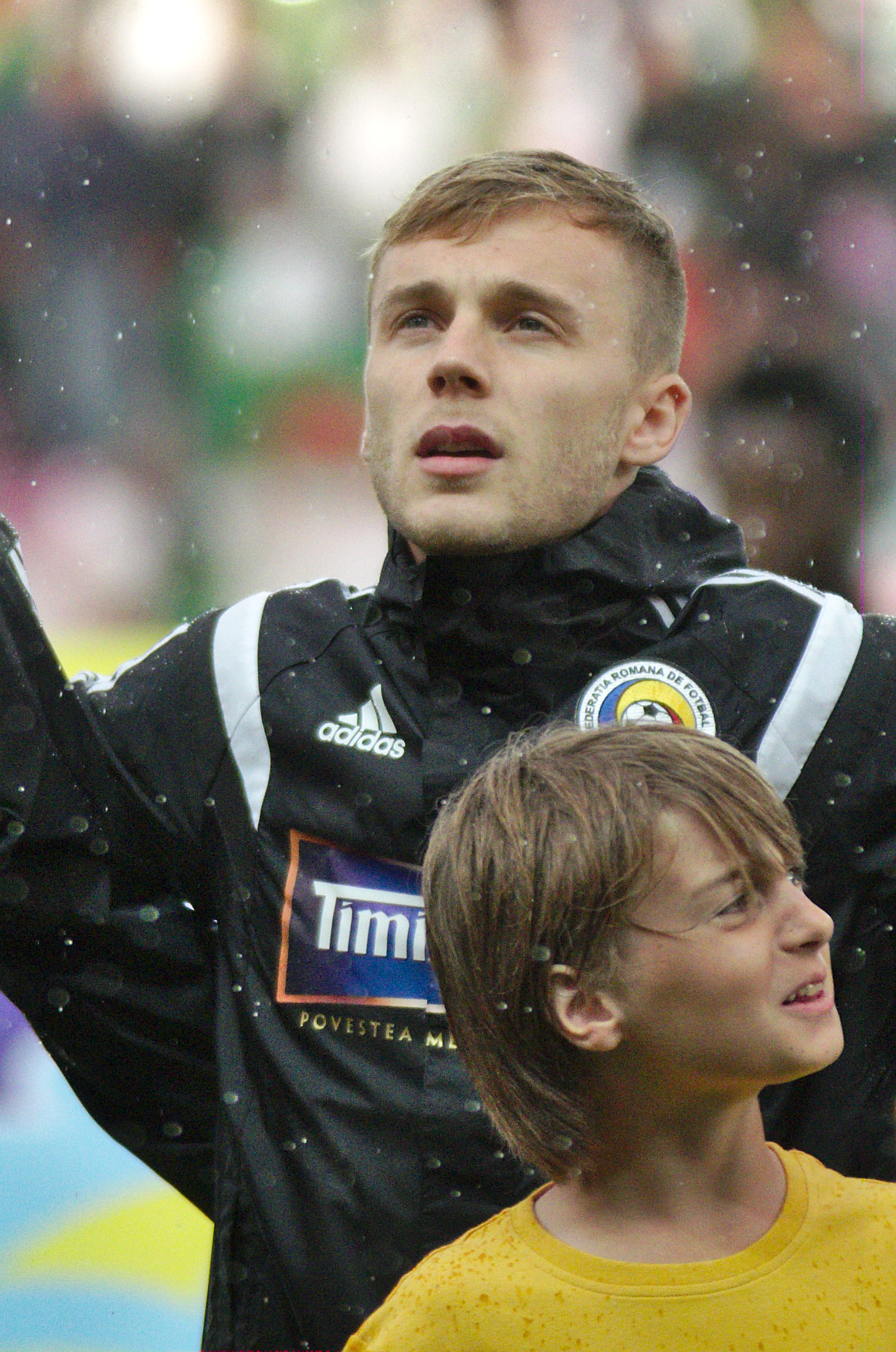 Algérie-Roumanie - 20140604 - Alexandru Maxim